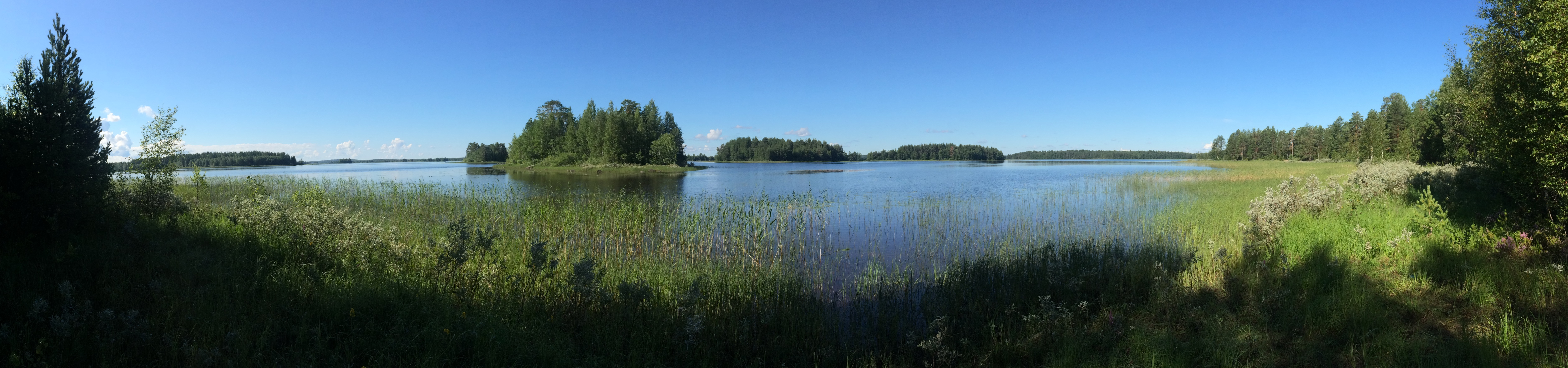 Гимольское озеро.